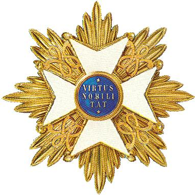 Eigen tekenwerk, Robert Prummel